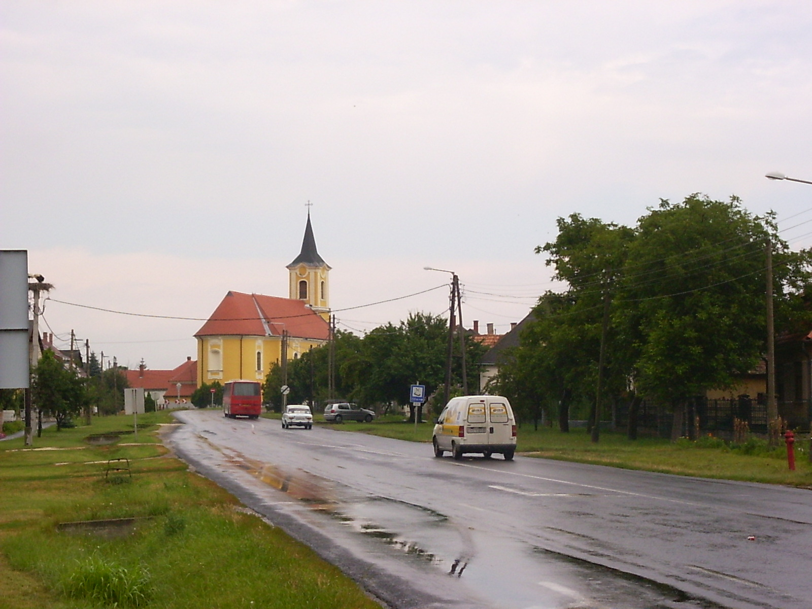 Mezőörs a 81-es útról